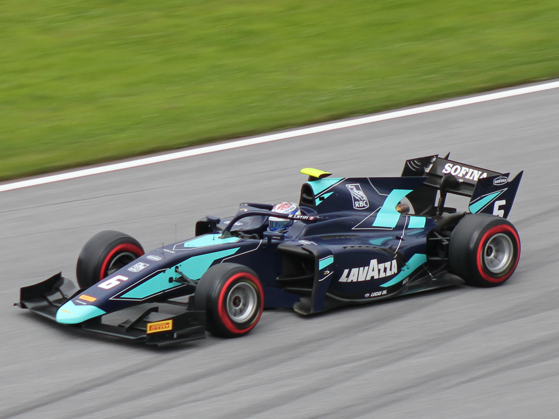 06 NAME beim Rennwochenende in Österreich 2018 (1)